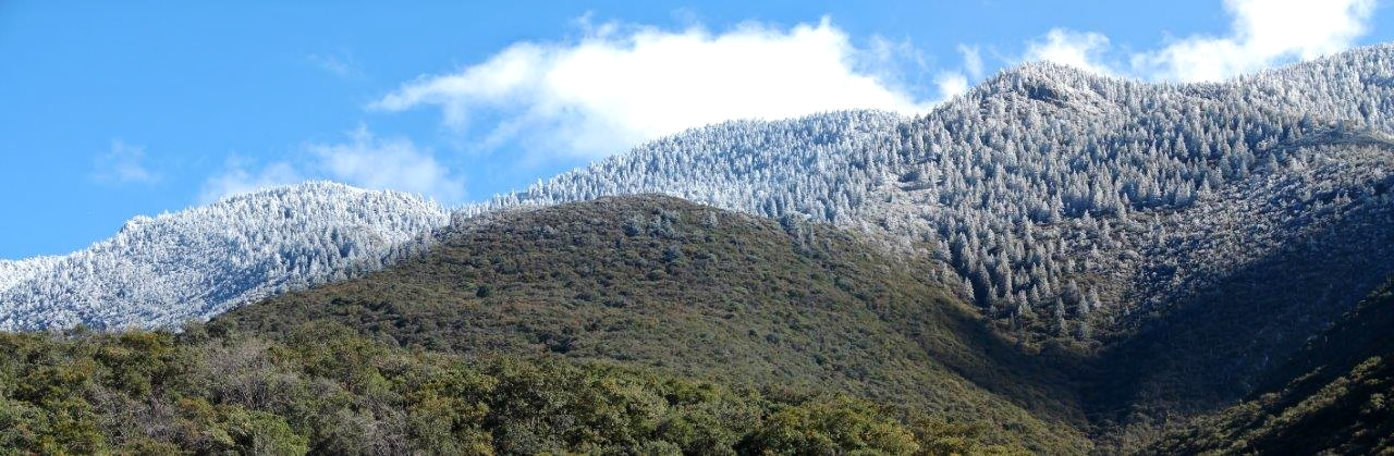 Nevada Diciembre del 2008, Vista Cerro del Penitente, Sierra de Zapalinamé.